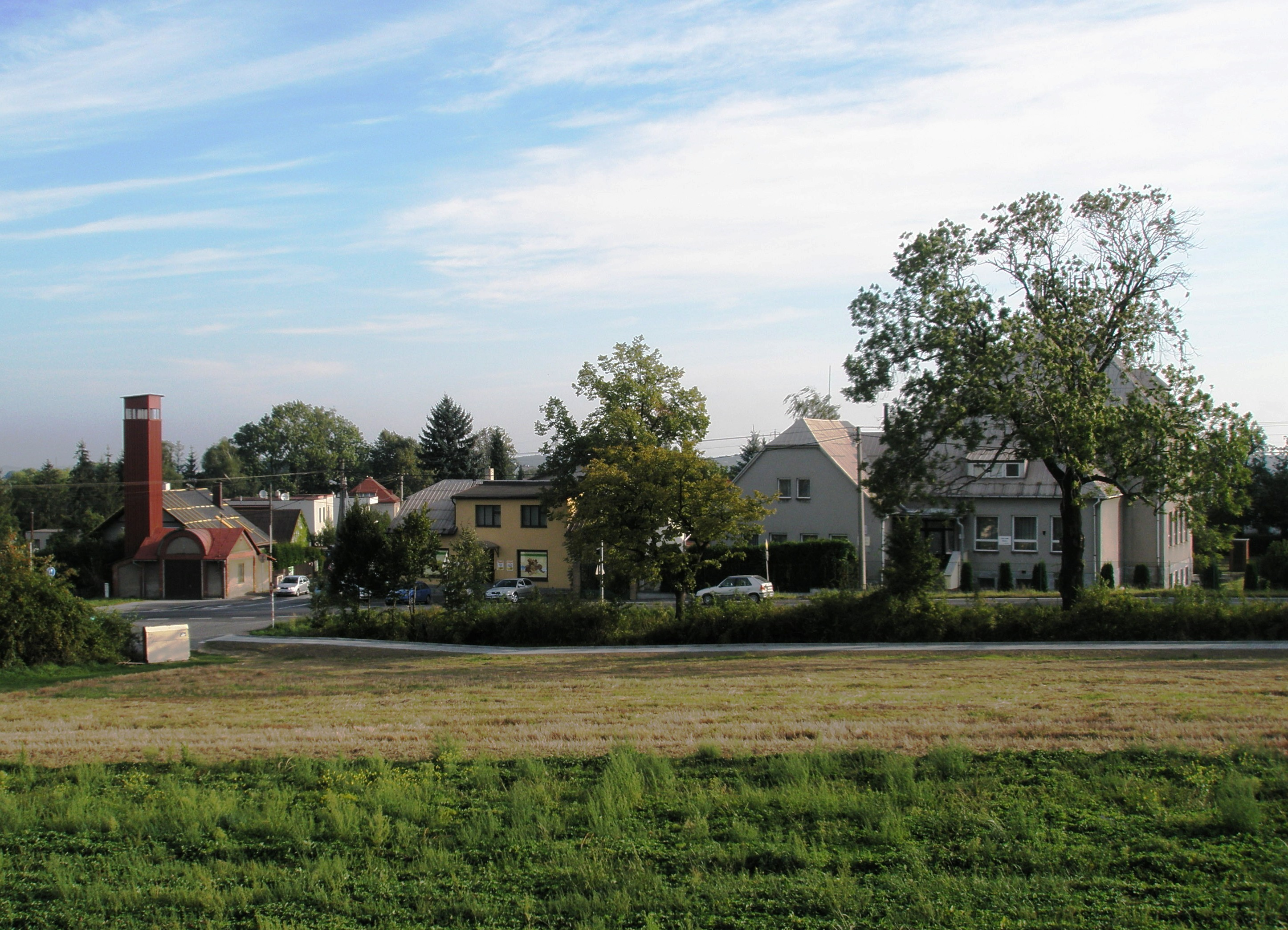 Nebory (Třinec) - pohled z modlitebny ke škole, obchodu a hasičské zbrojnici